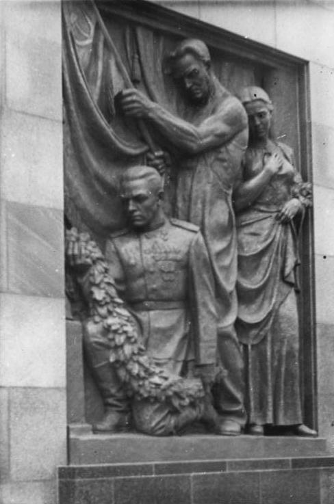 Illus-Funck- 9.11.49 Sowjetischer Ehrenfriedhof in Schönholz.In Schönholz bei [in] Berlin wurde ein neuer sowjetischer Ehrenfriedhof errichtet. UBz: Reliefs, die den Kampf der siegreichen Sowjetarmee versinnbildlichen. 4362-49